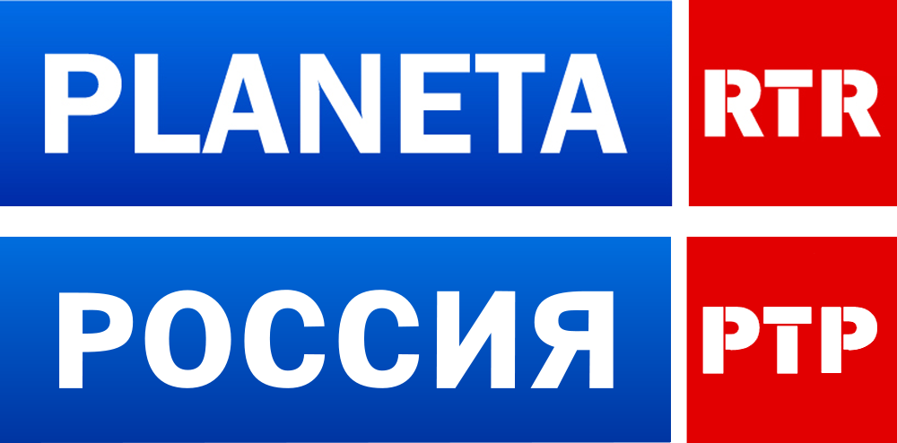 Логотип канала "РТР-Планета" для русскоязычных стран